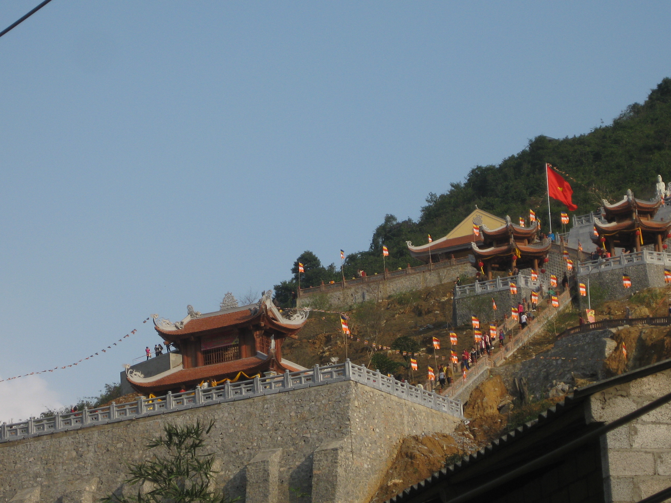 Quang cảnh chùa Phật Tích Trúc Lâm bên thác Bản Giốc, 2015.